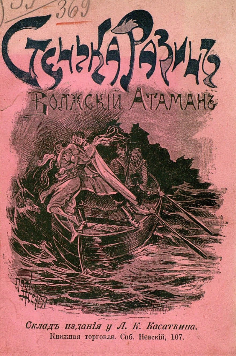 Стенька Разин (волжский атаман) : Легенда : Мое историческое исследование по преданиям калмыков Астраханской губернии / С. И. Глебов (Гнедич). — С.-Петербург : А. К. Касаткин, 1900. — 112 с. ; 18 см. — Изд. также под загл.: Жизнь и казнь Стеньки Разина (волжского атамана) .